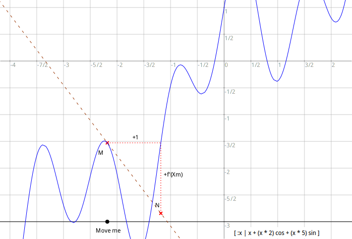 User defined function with its curve and dynamic tangent plotted.